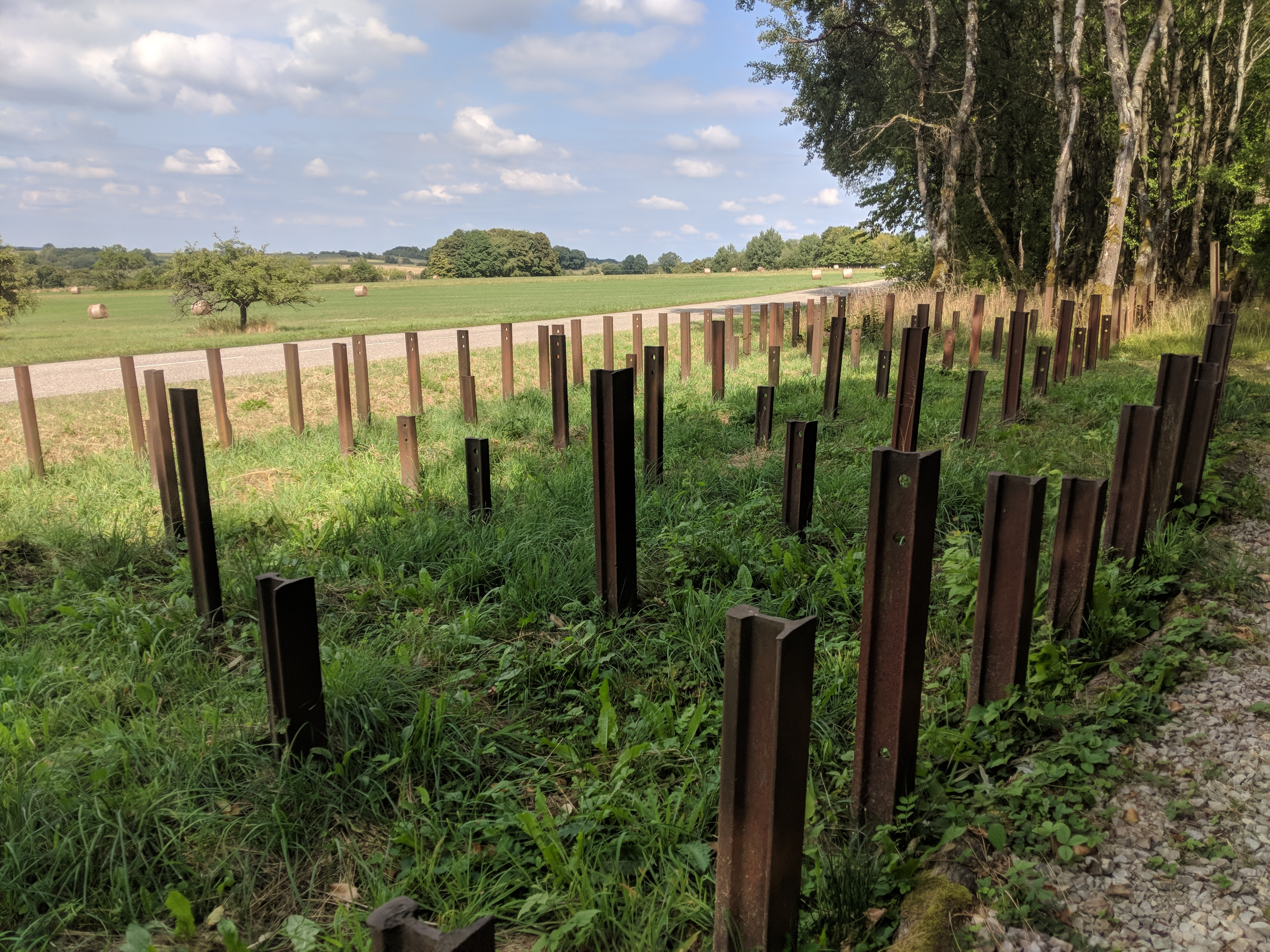 Rails antichar de plusieurs mètres de long enfoncés dans la terre